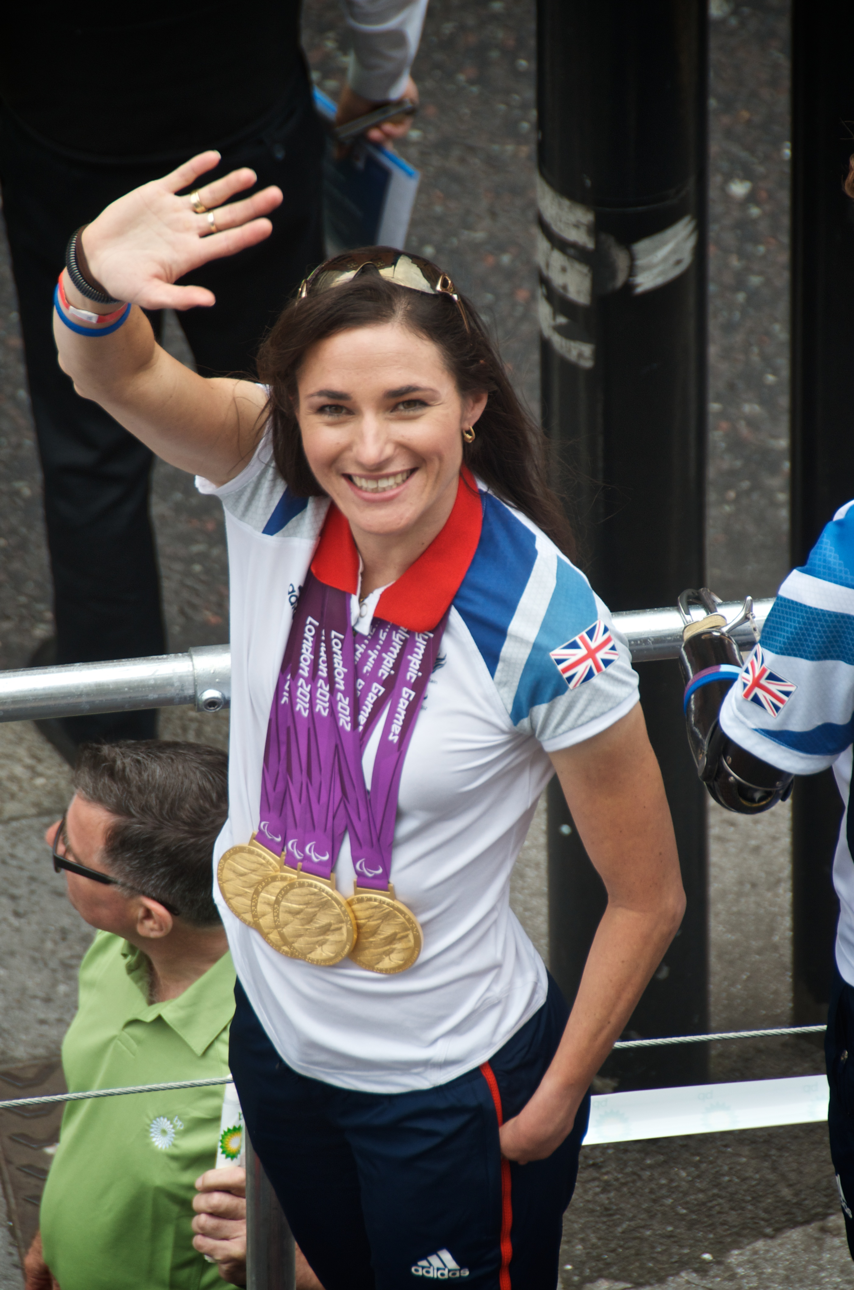 Cycling